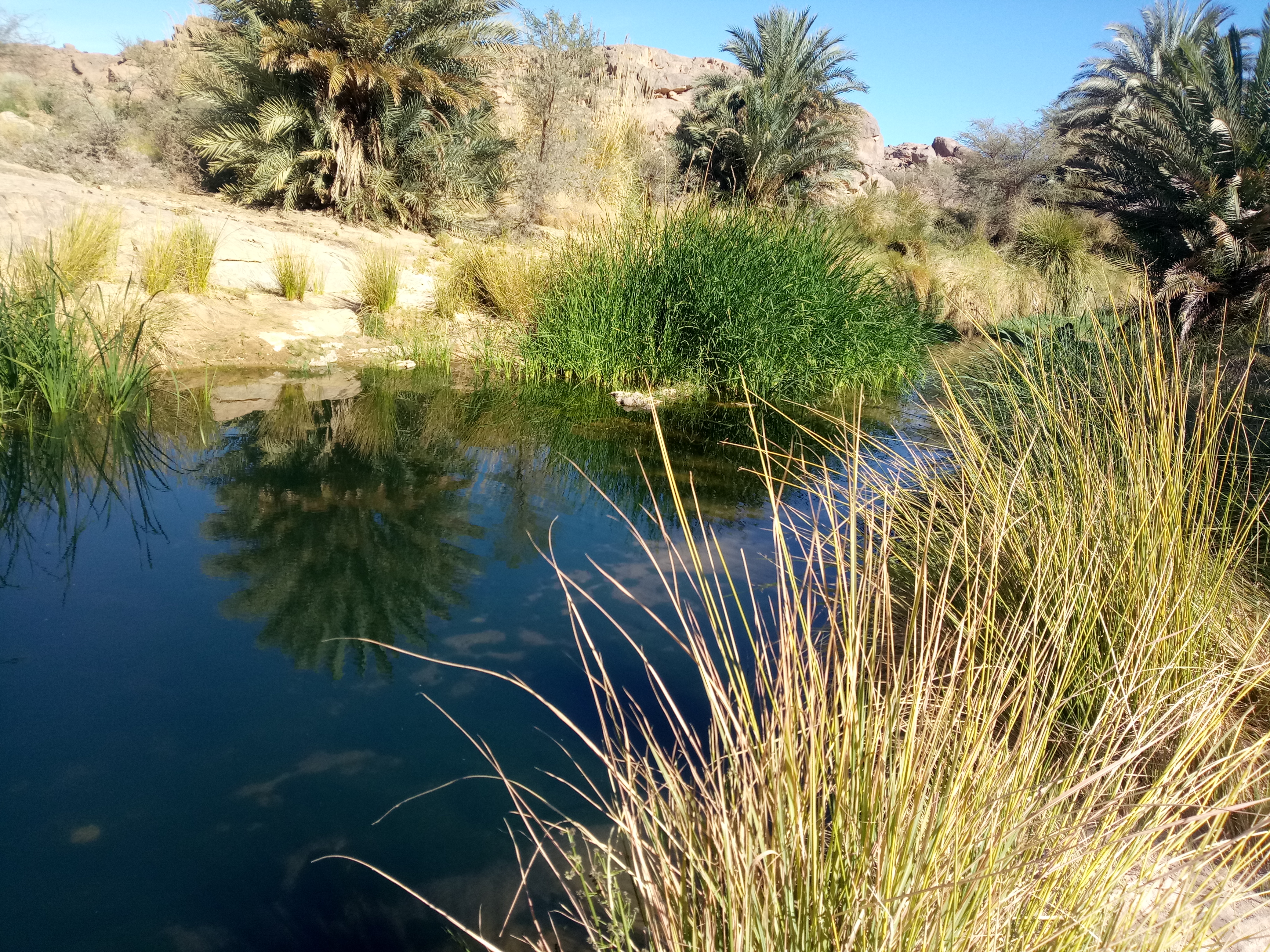 un paradis au milieux du disert Sahara Algérie ( Tamanrasset)